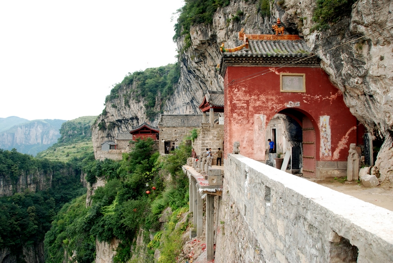 金灯寺